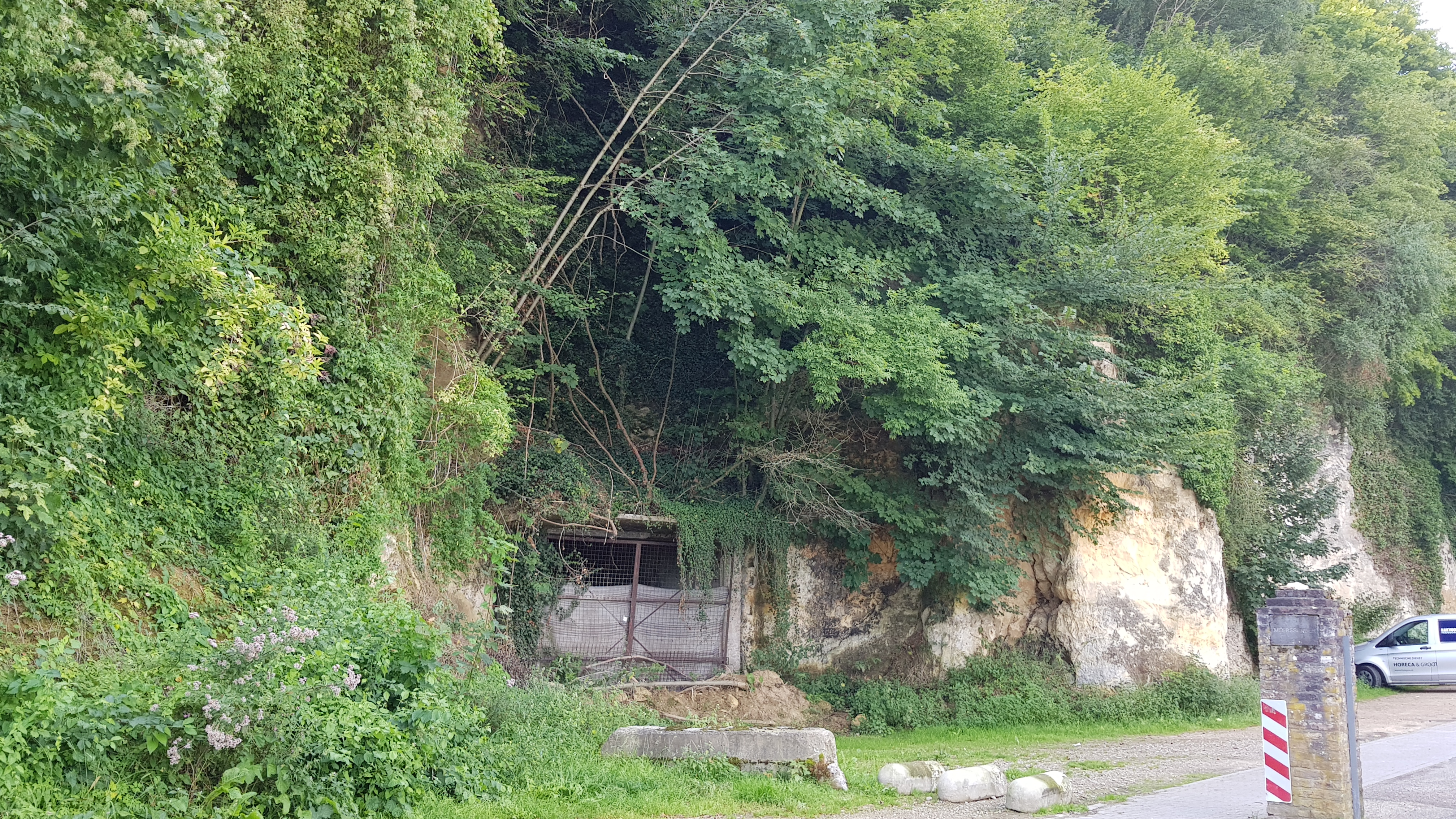 Groeve Schunck, Geulhem, Nederland